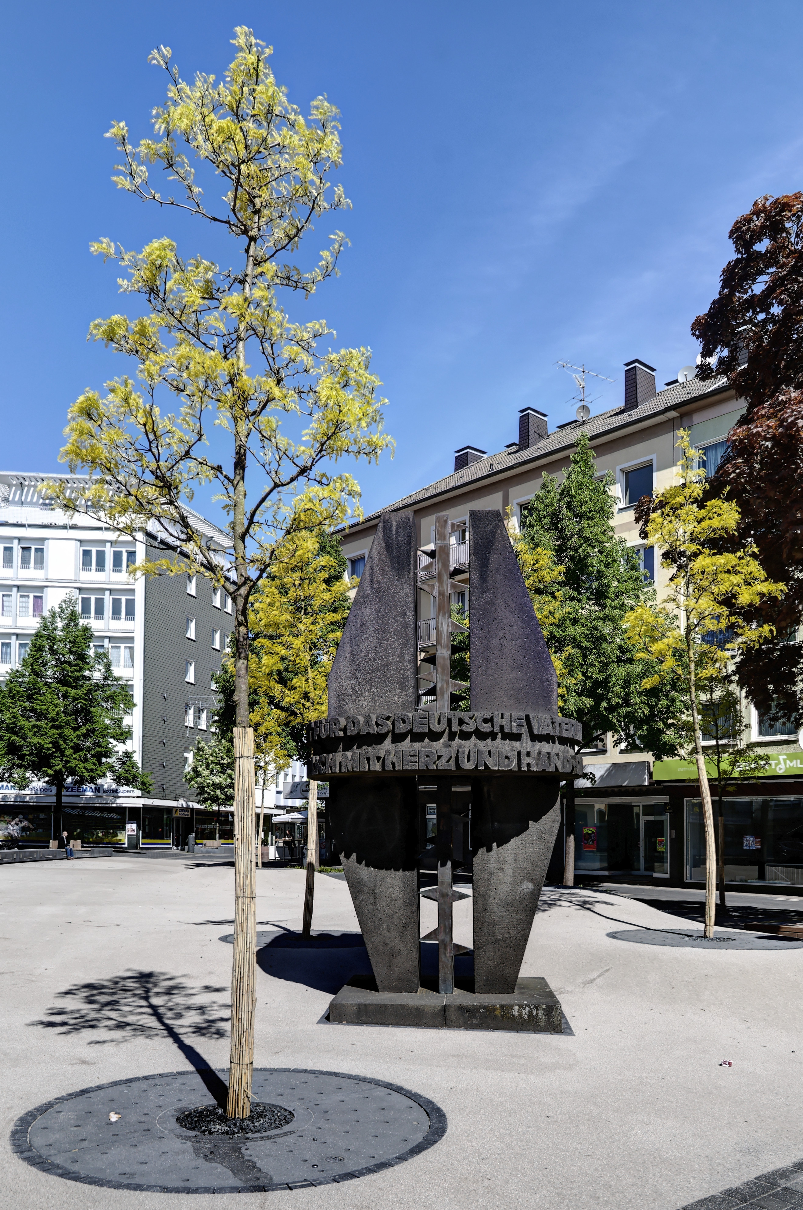 Solingen, Denkmal am Entenpfuhl - Künstler: Henryk Dywan